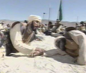 wamadat03